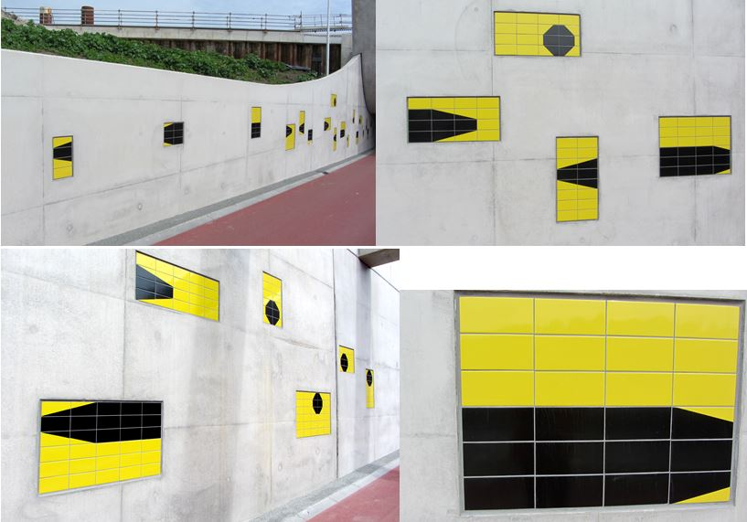 Frank Havermans en Karin van Pinxteren, 2015